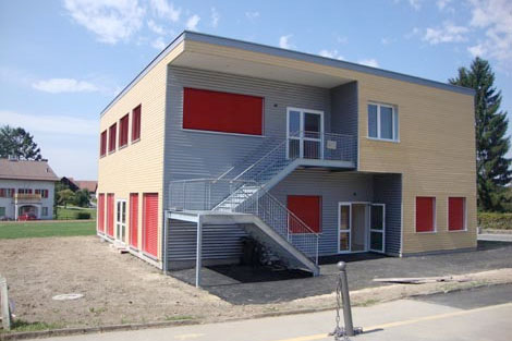 Foto des neugebauten Kindergarten in Cugy, Kanton VD, Schweiz